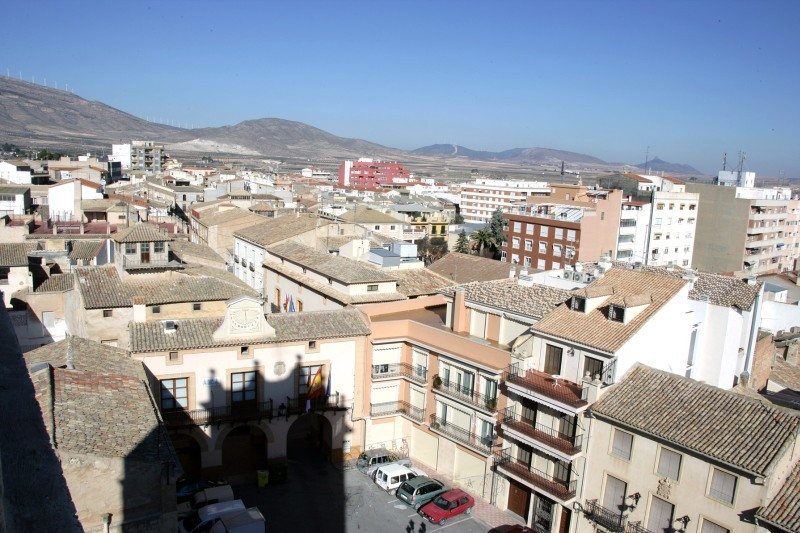 Vista panorámica de Caudete desde la torre de la basílica de Santa Catalina